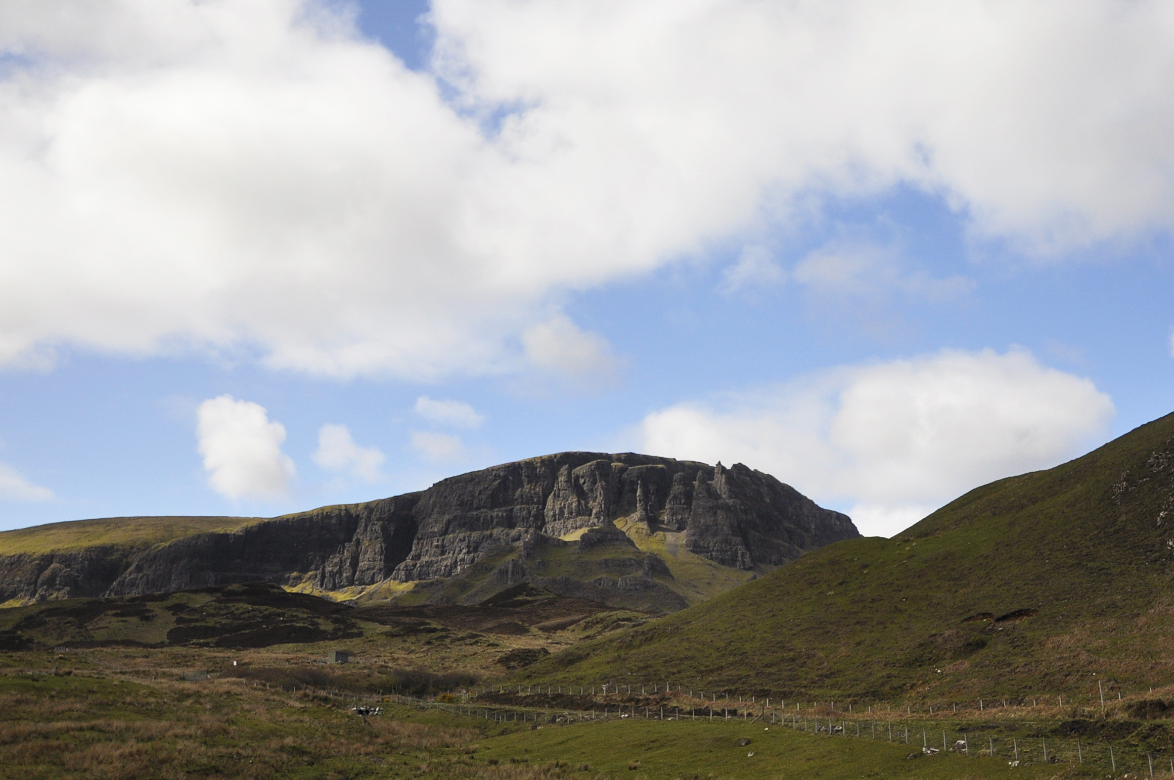 Quiraing op Skye, Schotland